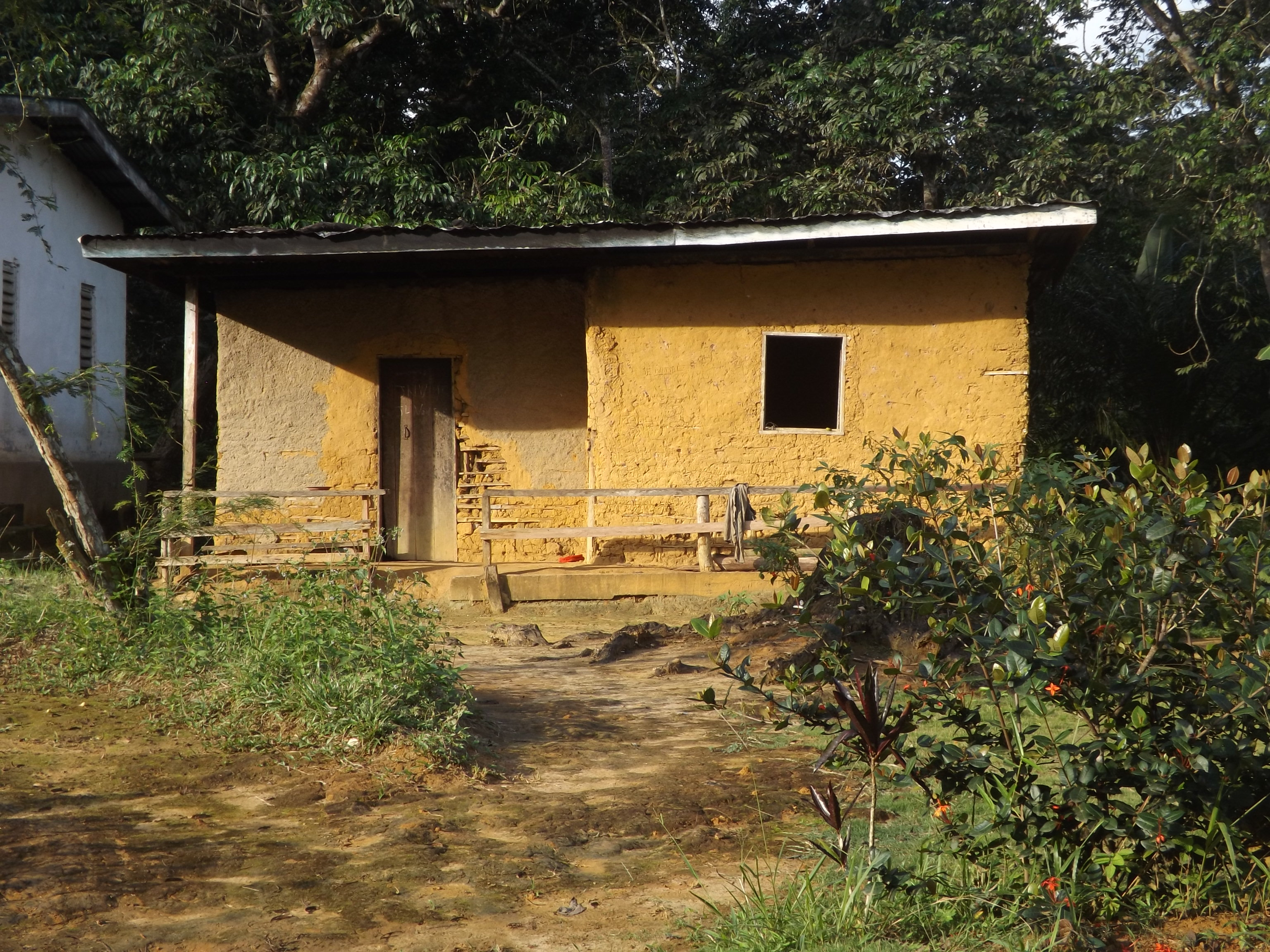 Maison rurale en adobe (Tayap, région du Centre, Cameroun)